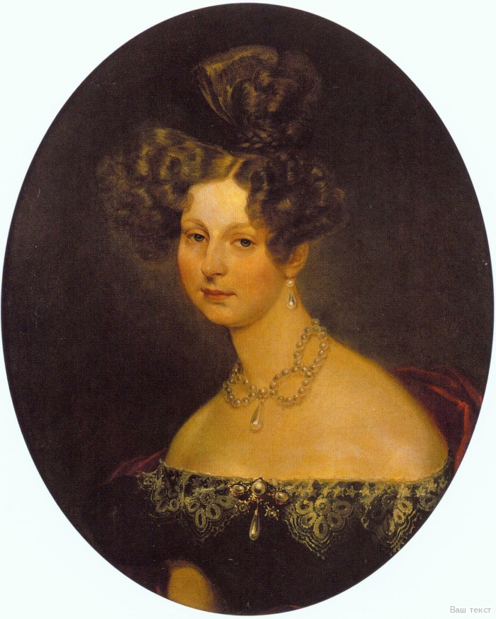 Портрет великой княгини Елены Павловны 1806—1873), жены великого князя Миаила Павловича (1798—1849)